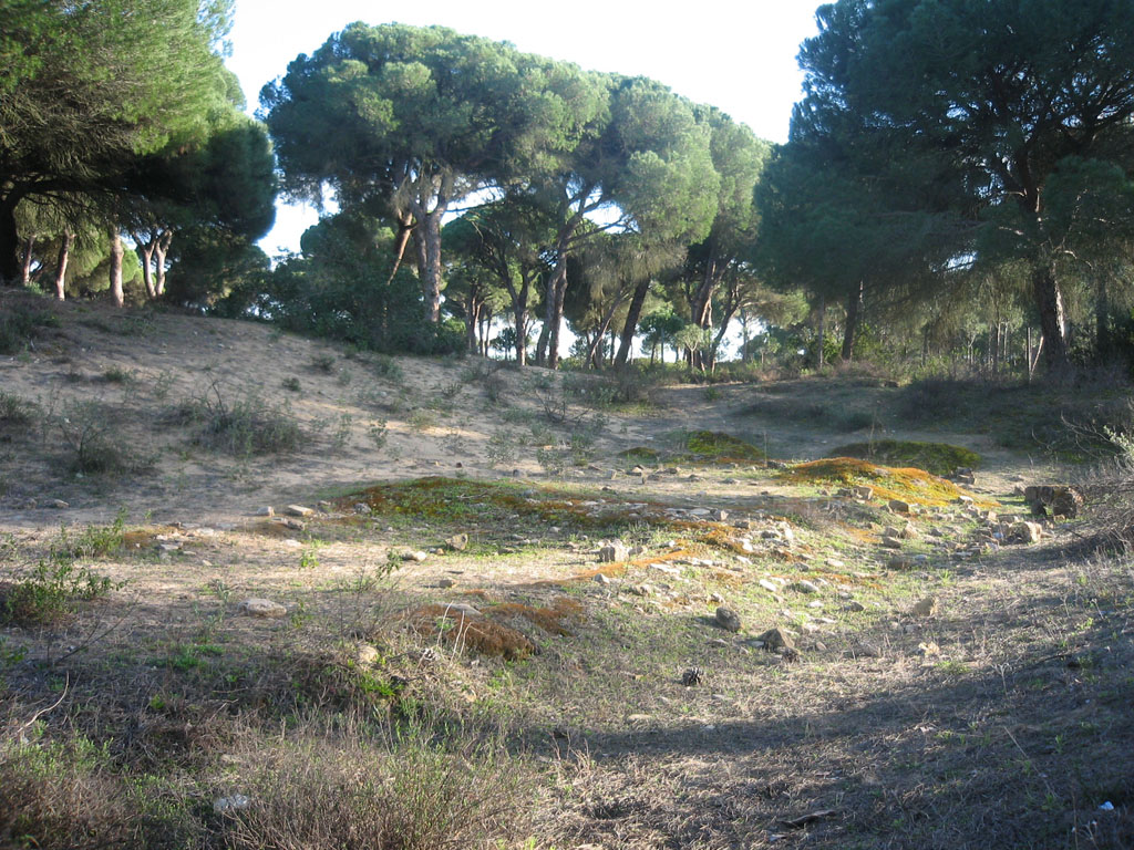 Yacimiento arqueológico de El Tesorrillo del Pinar de la Algaida, Sanlúcar de Barrameda (Cádiz-Andalucía-España)